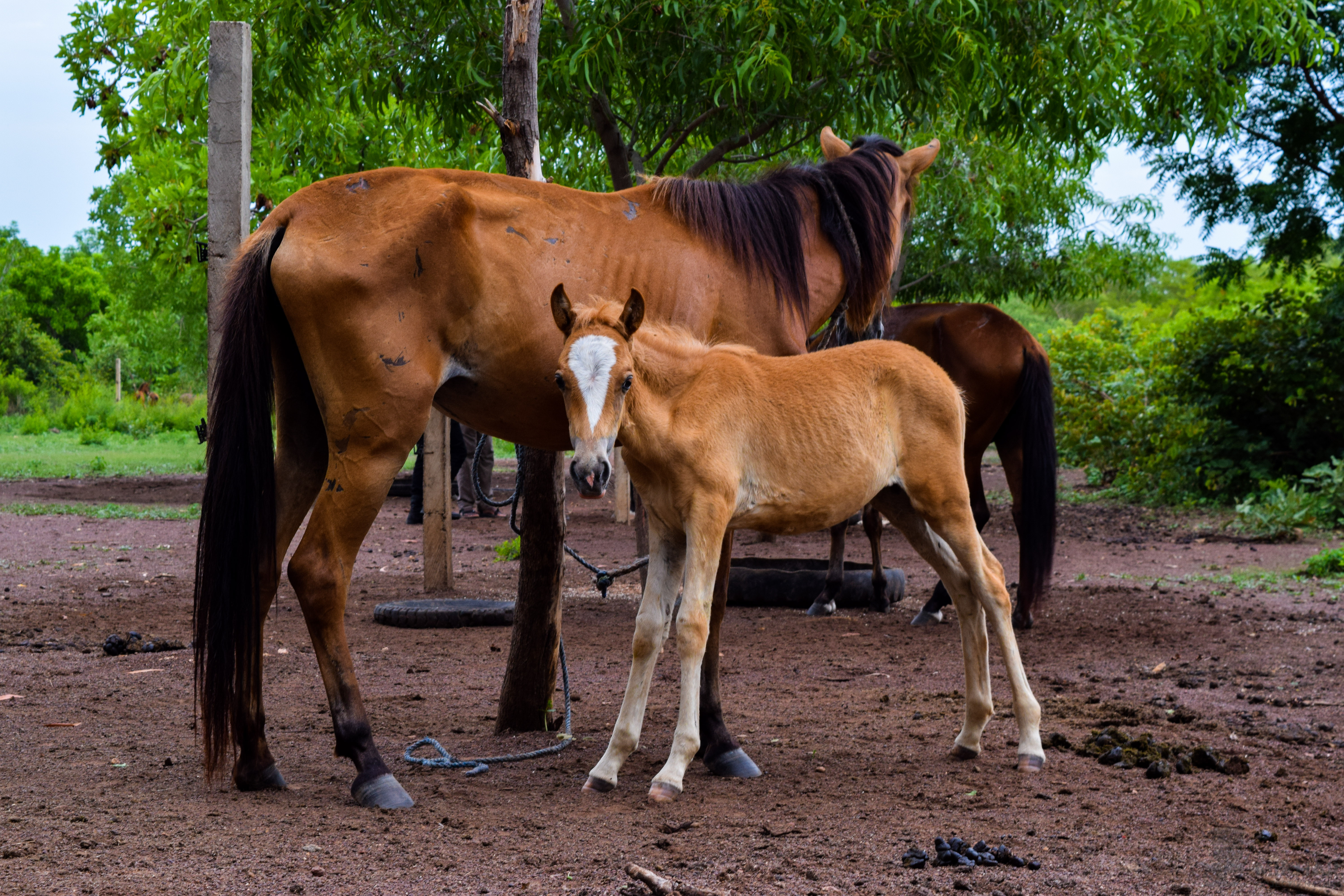 Jument et son petit dans le ranch de Tagatatatou à Dassari (Tanguiéta)